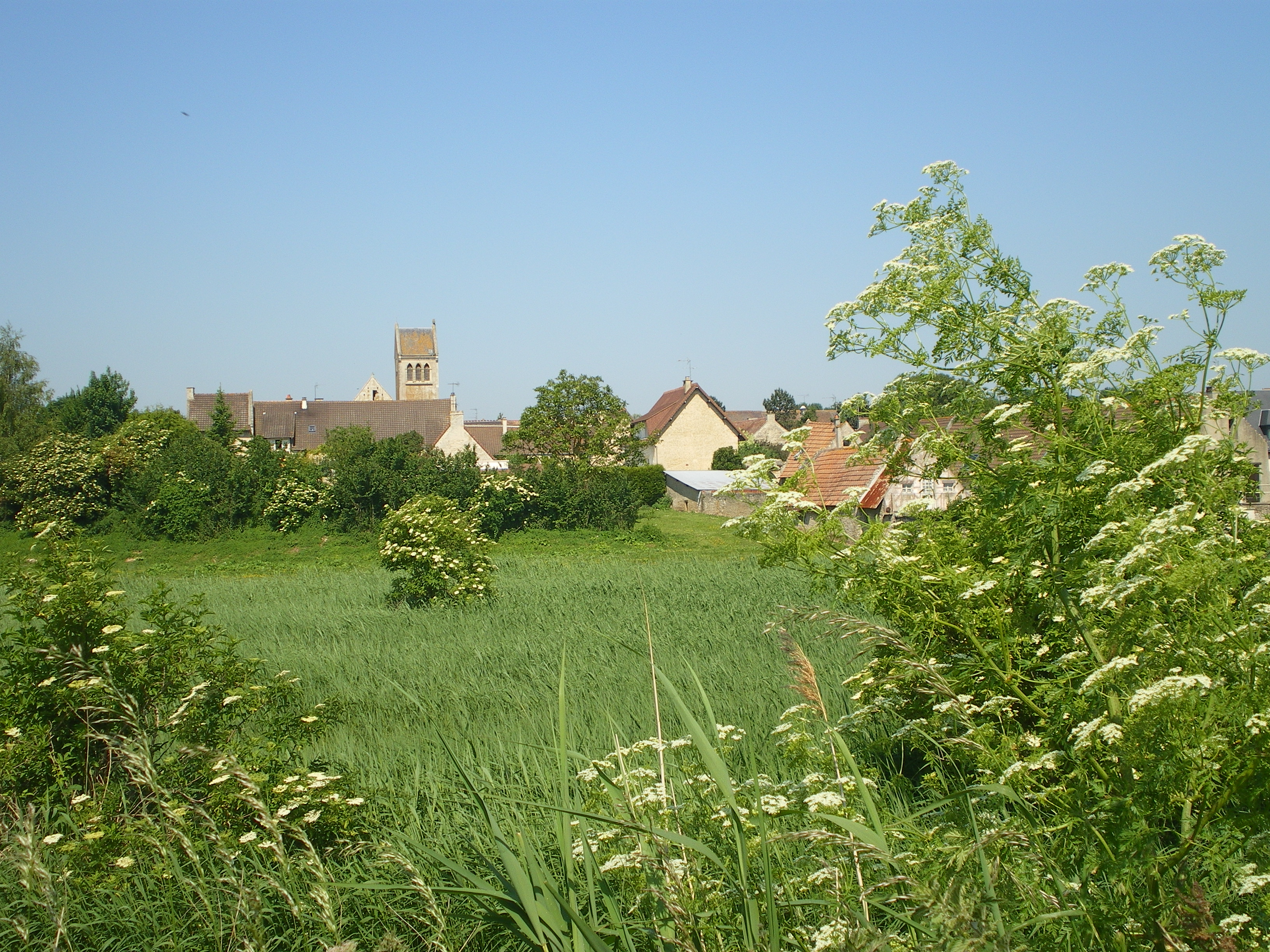 Bénouville-Le Port, le centre ancien de Bénouville, vu depuis le chemin de halage au bord du Canal de Caen à la mer.